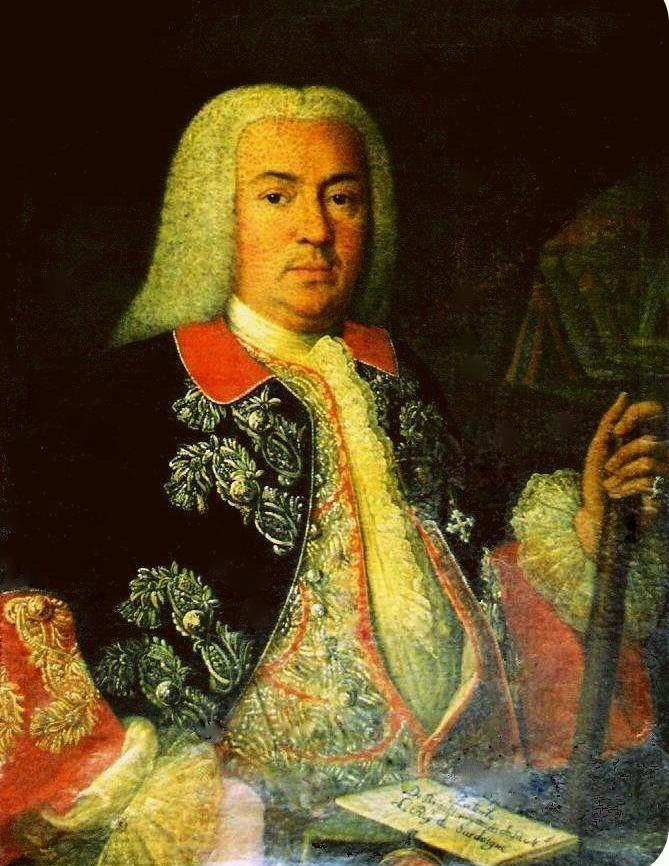 Oberst Johann Martin Keller, 1703-1766, Gemälde in Privatbesitz